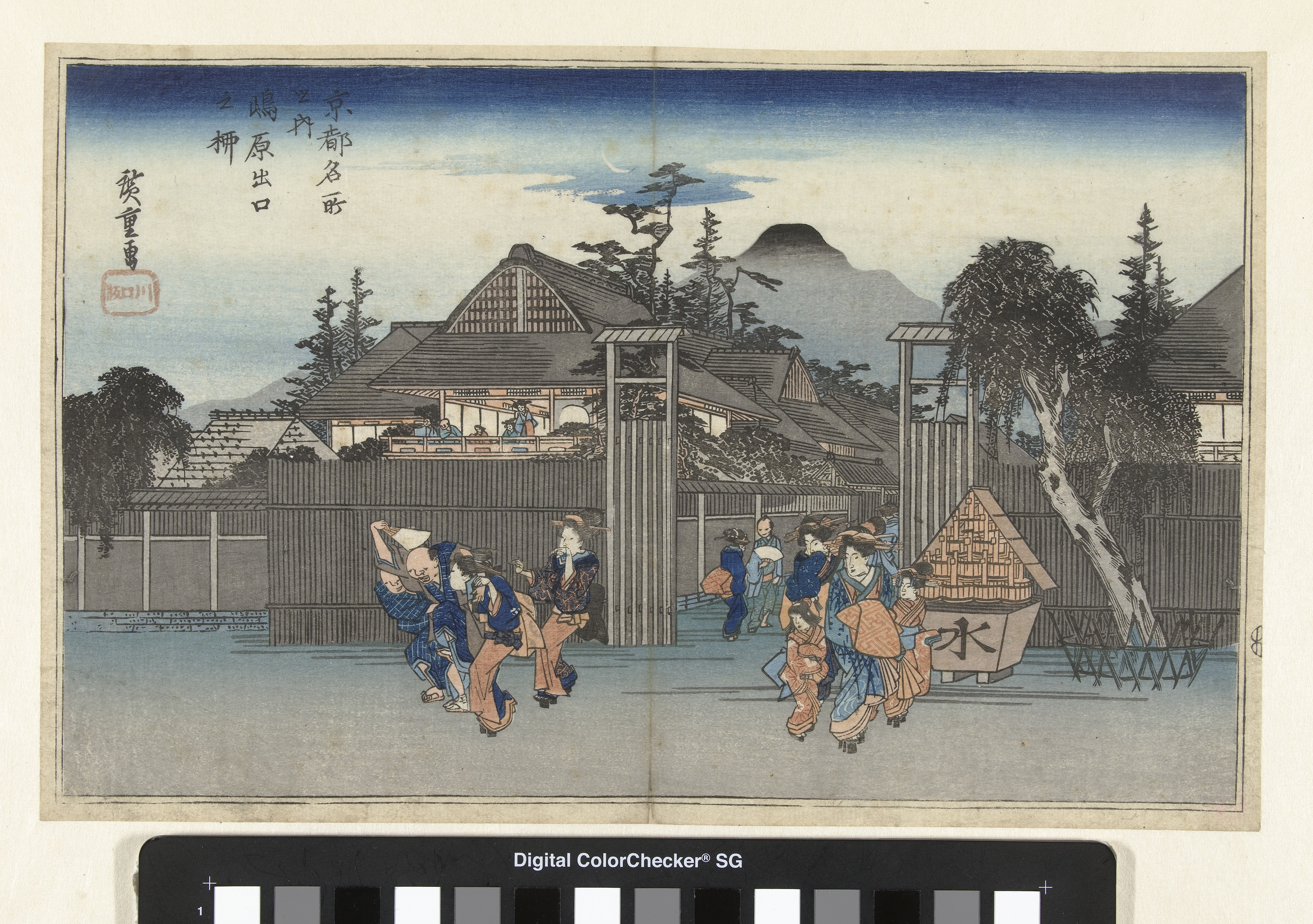 Gezicht op de toegangspoort naar de plezierwijk Shimabara in Kyoto; een dronken man ondersteund door een man en een vrouw, bekeken door lachende courtisanes en bezoekers op het balkon van het restaurant achter de poort; rechts bij de poort een waterbassin en een wilg. Label Line: mentioned on object Hiroshige (I) , Utagawa (1797 - 1858), 1832 - 1836, kleurenhoutsnede; lijnblok in zwart met klerublokken Collection: prenten; Japan (collectie)